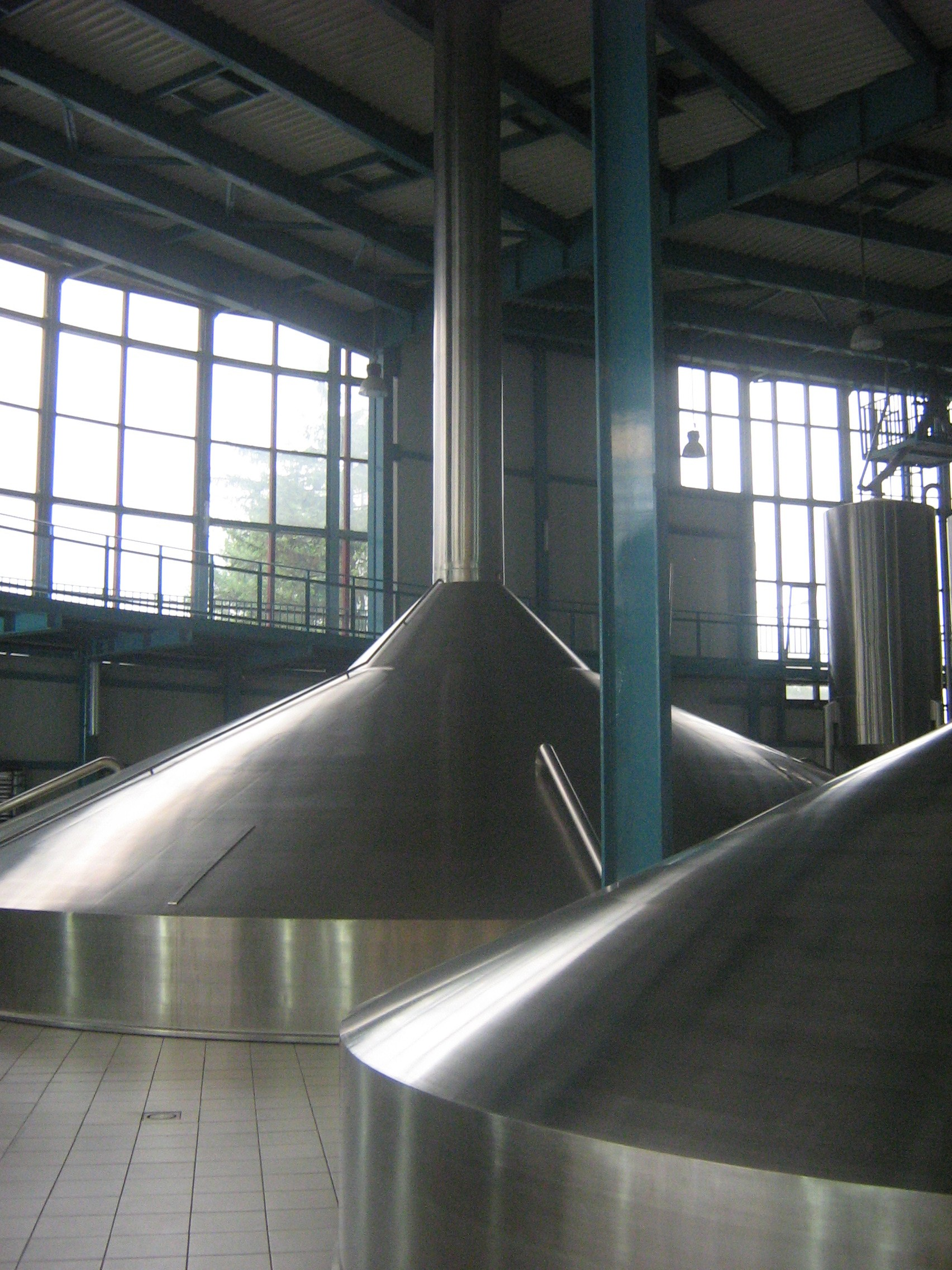 W tle kadź filtracyjna